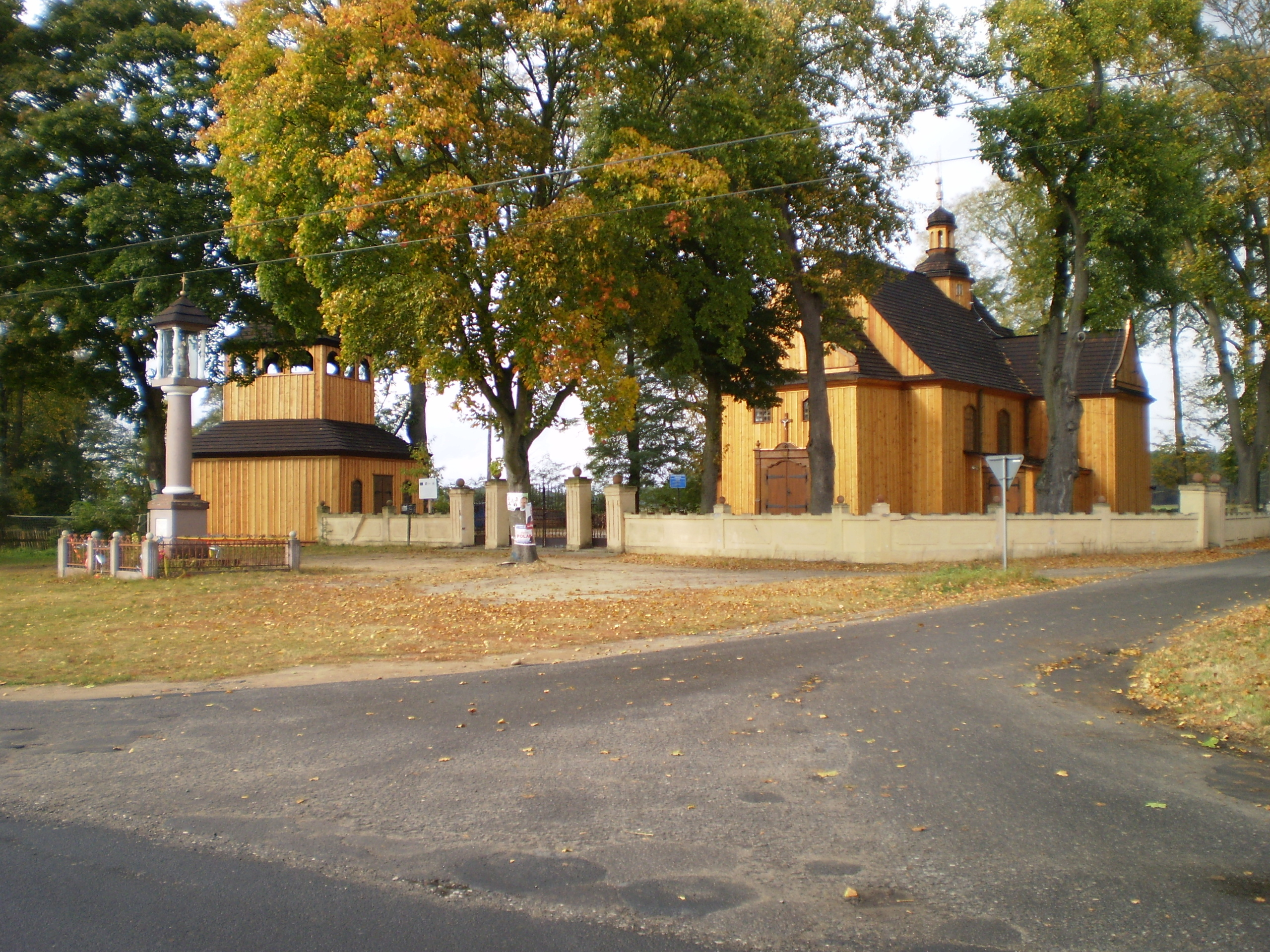 Kościół z XVIII wieku w Kałowie, po renowacji w październiku 2011r. (m.in. powrót do dachu gontowego).